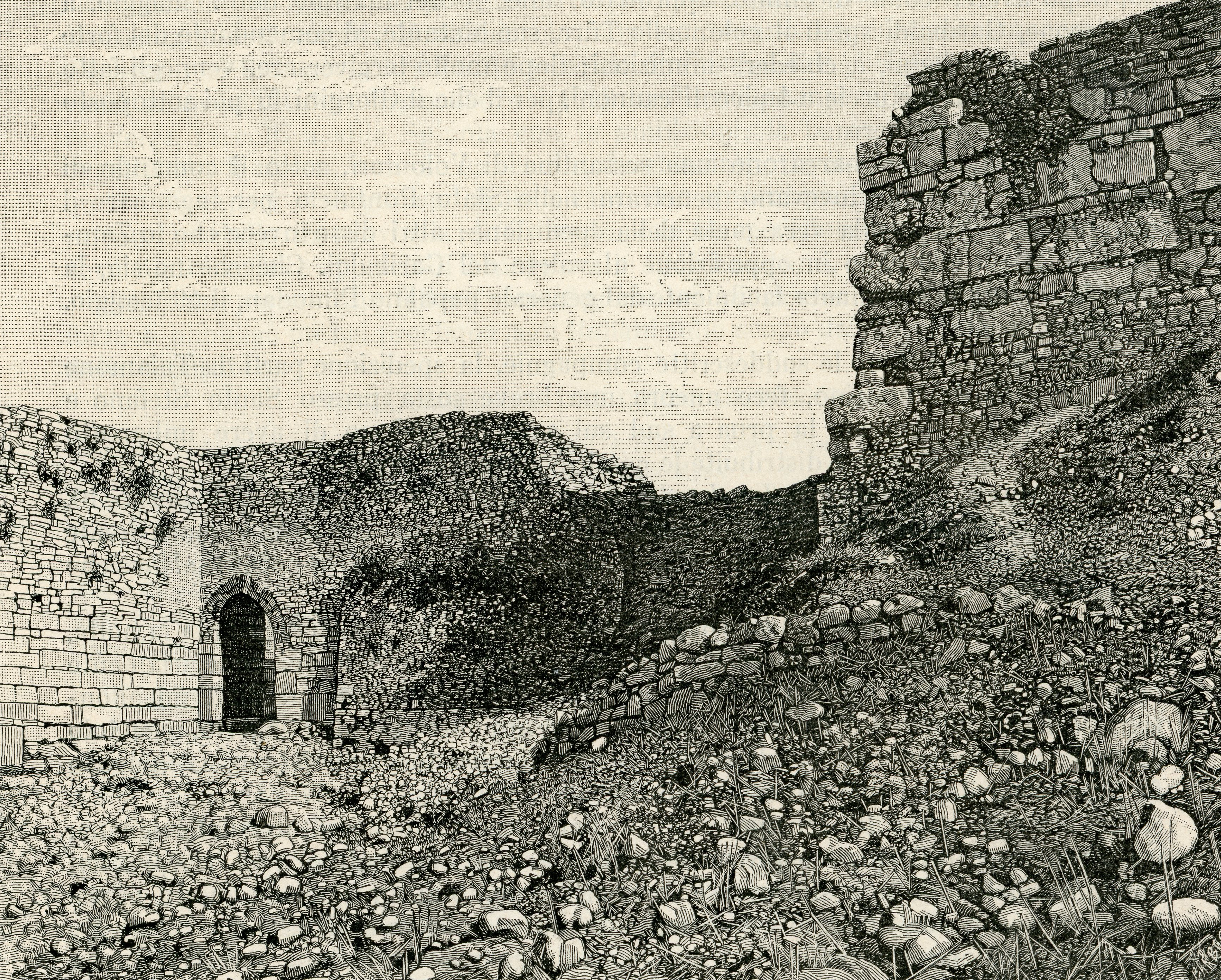 Monte San Giuliano: mura ciclopiche (xilografia di Barberis 1892).